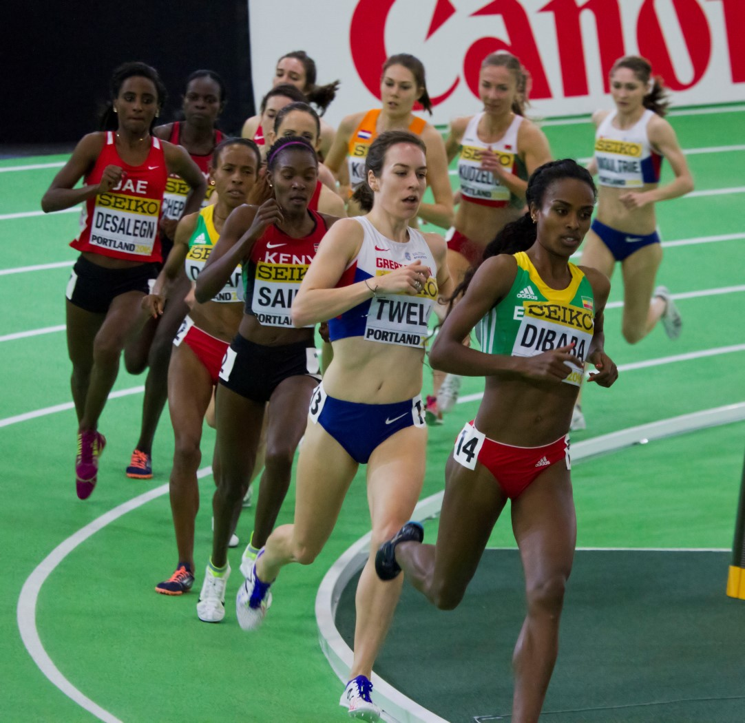 5101 dibaba 3000m